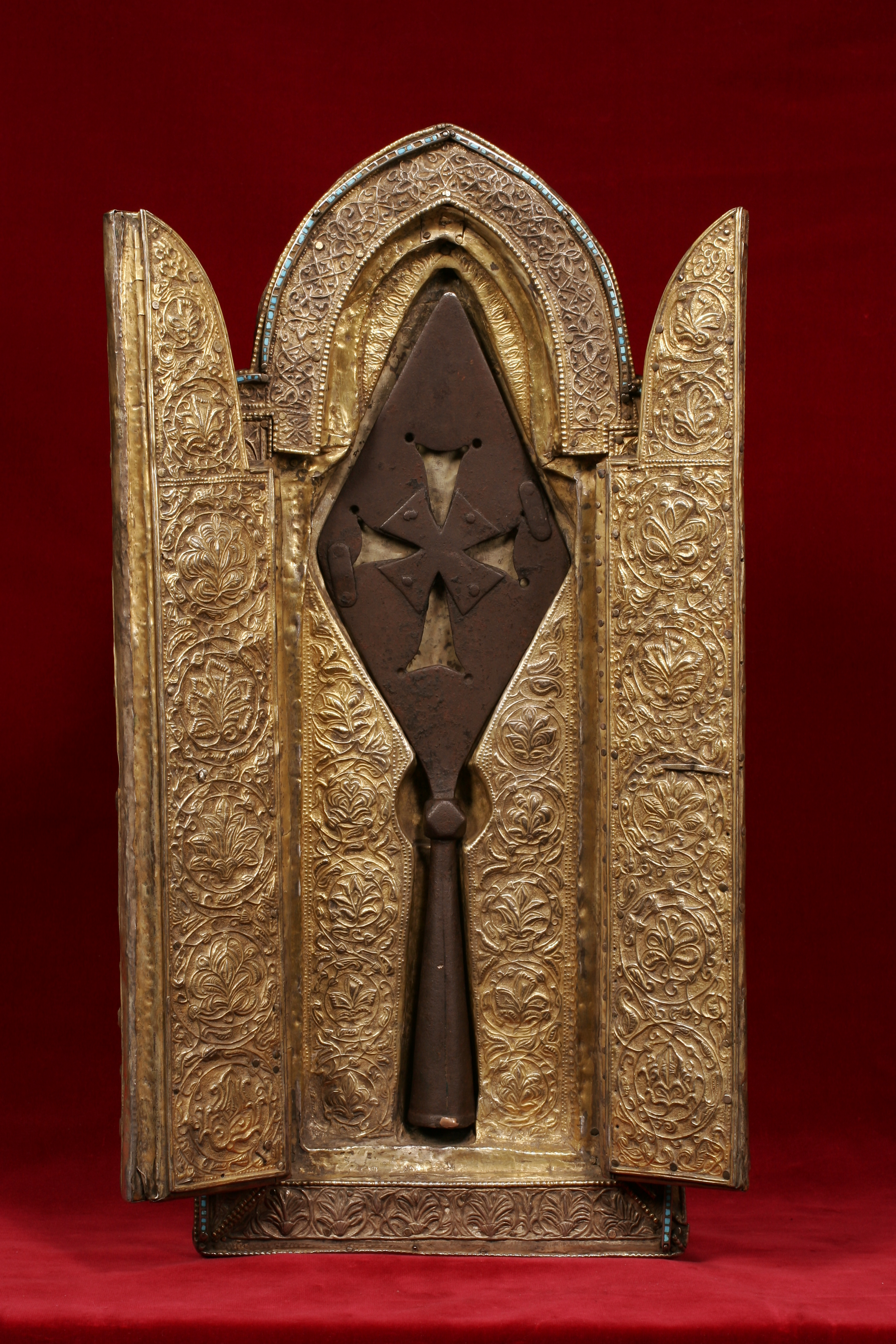 Святое копье